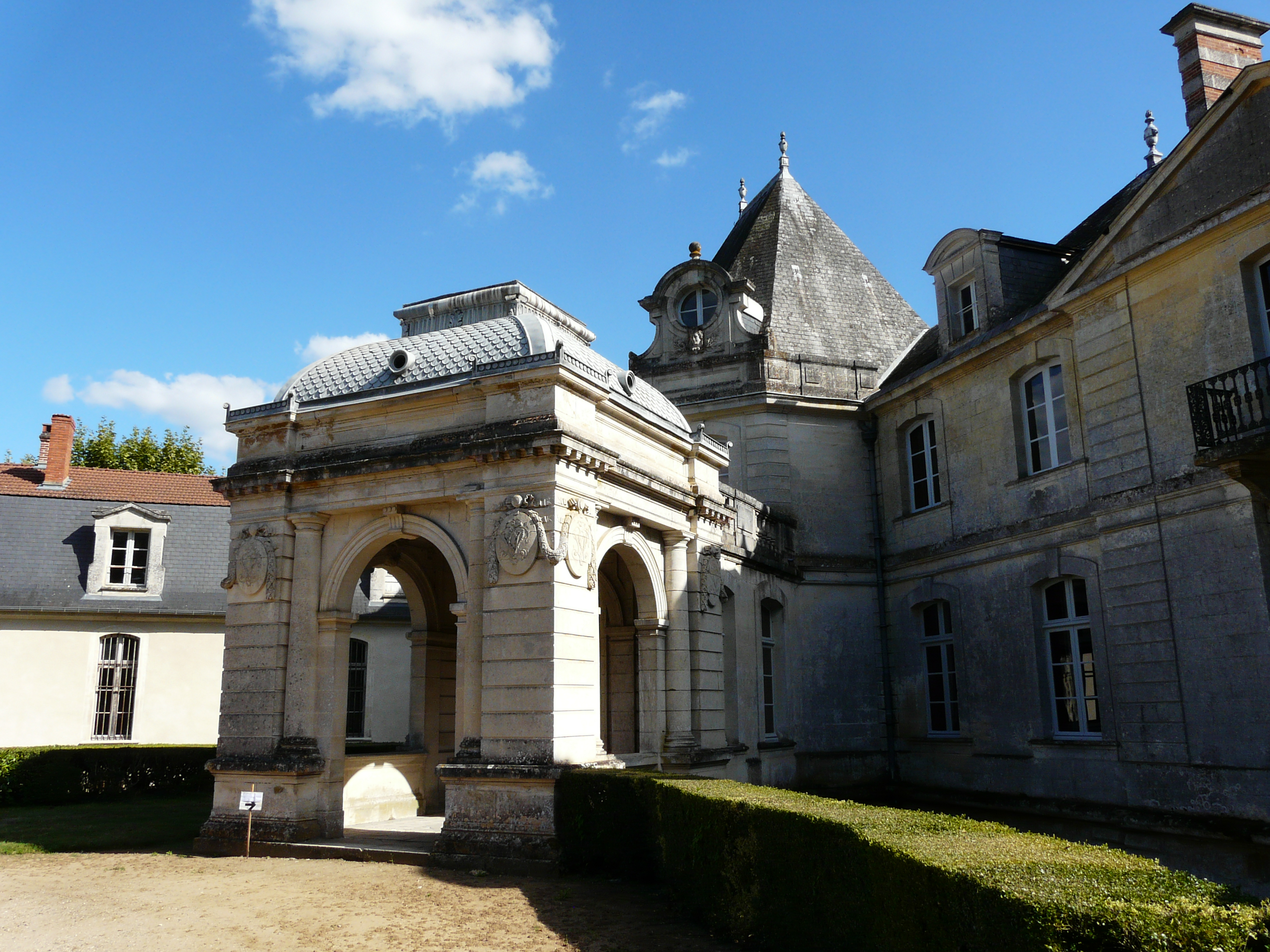 L'entrée du château de Tiregand, Creysse, Dordogne, France.